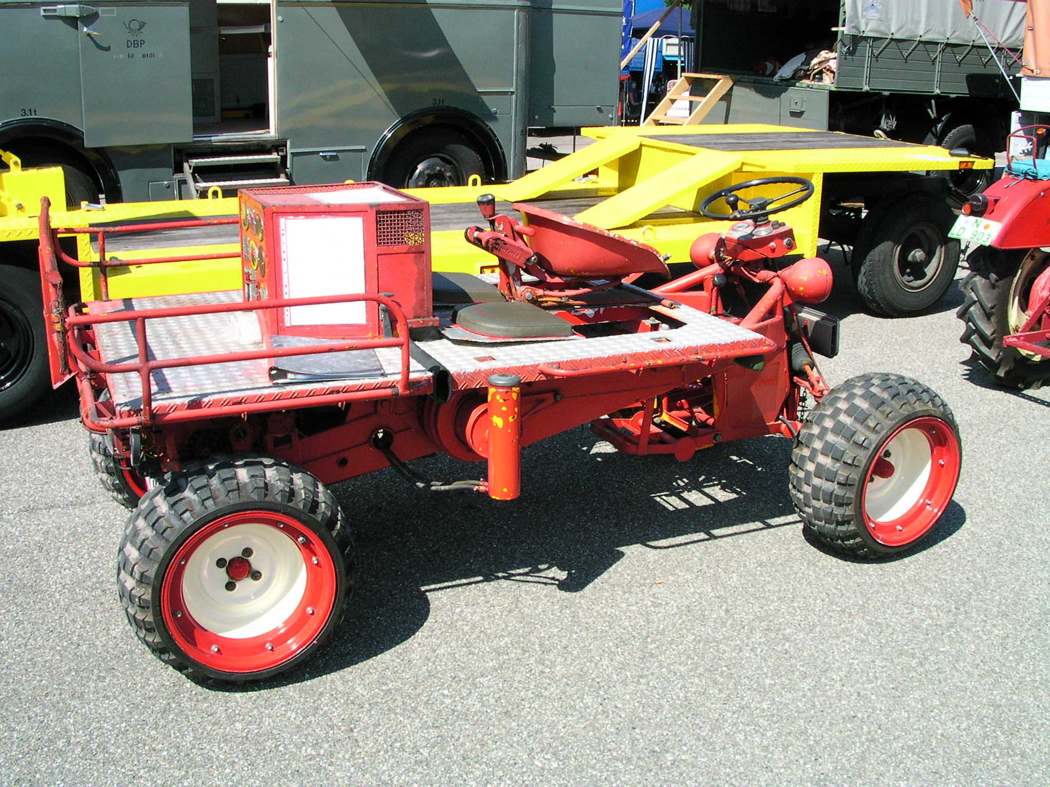 Wörth am Rhein, Oldtimer-Treffen bei Daimler-Chrysler. FAUN Kraka, 1962 entworfen, "LIPSOID"-Reifen ab 0,5 bar, Goggomobil-Motor, 400 ccm, 12 kW, 15,5 PS Das Fahrzeug ist zusammenklappbar und kann aus der Luft am Fallschirm abgeworfen werden